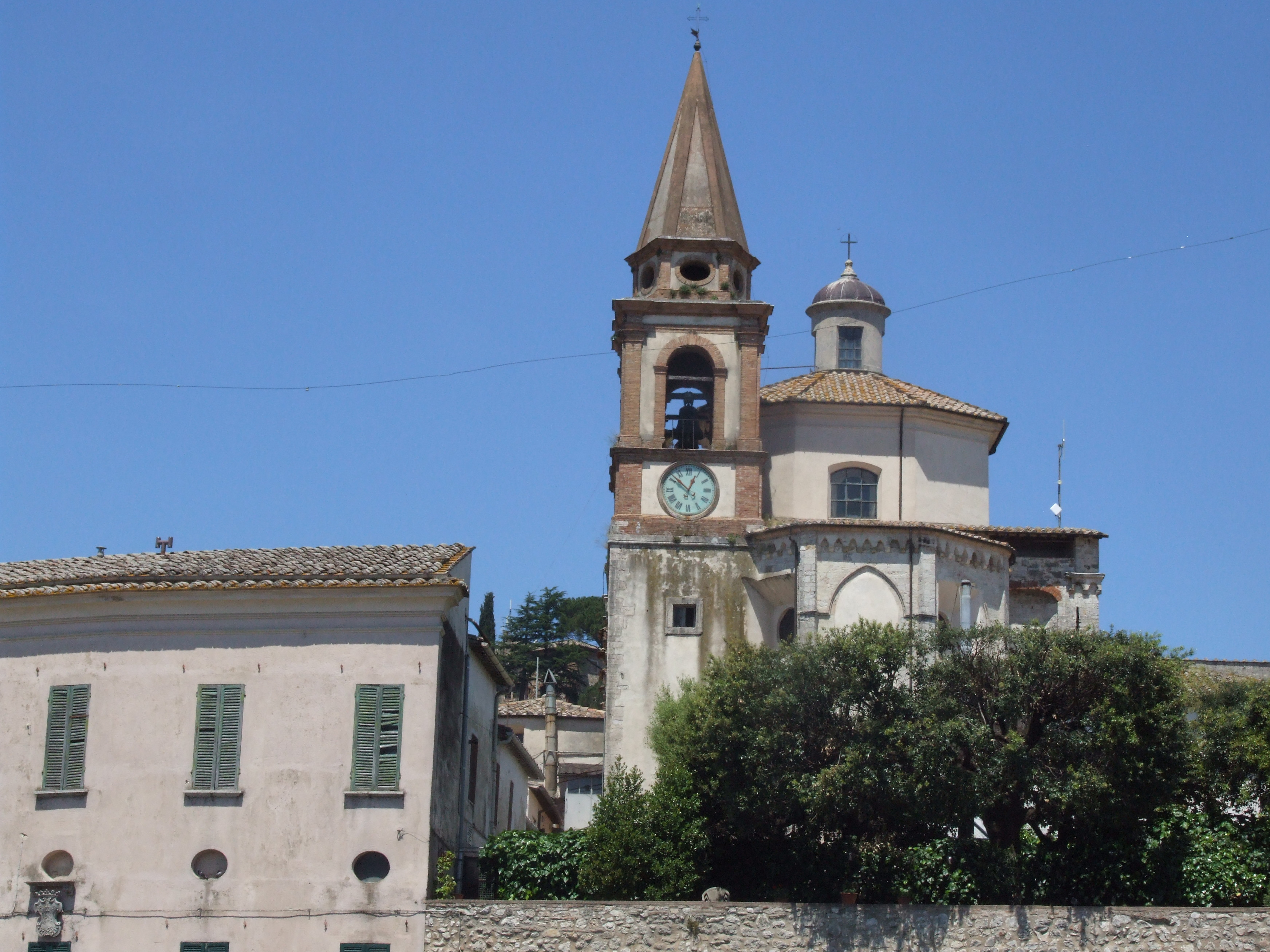 Chiesa di San Francesco This is a photo of a monument which is part of cultural heritage of Italy.